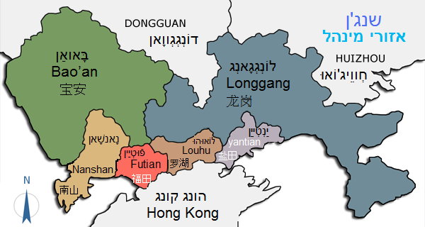 עריכה מחדש של אזורי מנהל שנג'ן